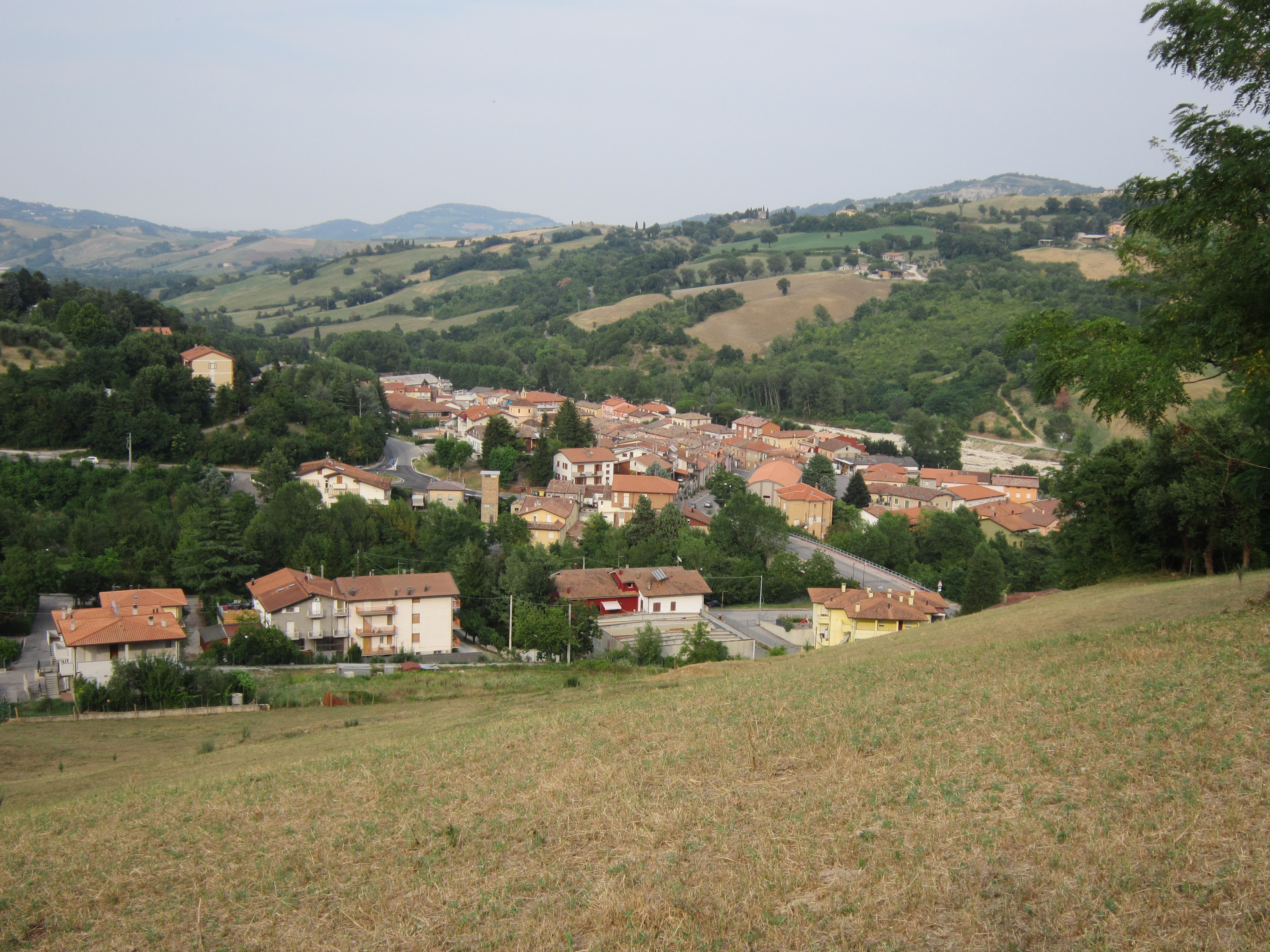 Panoramica su Montescudo dalla strada per Monte Grimano Terme (luglio 2015)